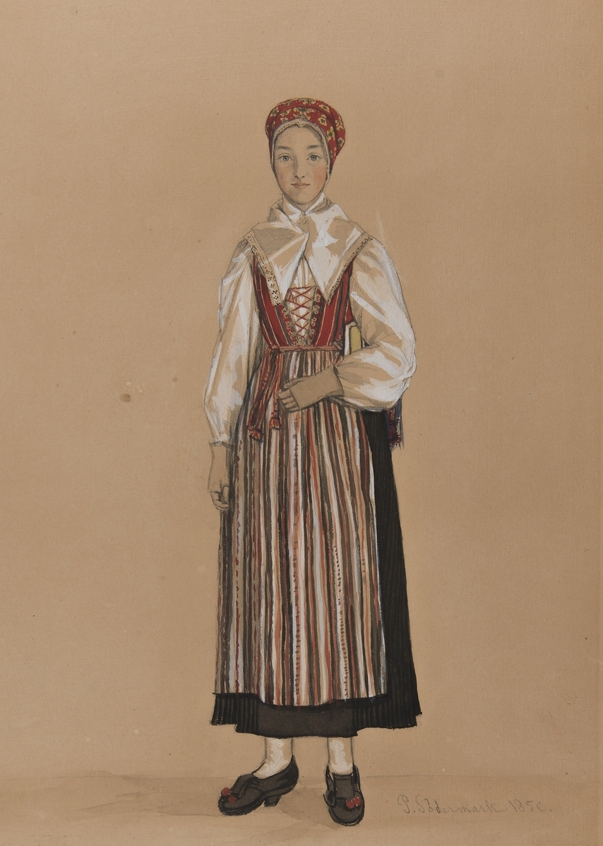 Kvinna, i helfigur, Lekatts Karin i Söndagsdräkt. P. Södermark 1850 depicted place: Q10556734 (Q10556734)